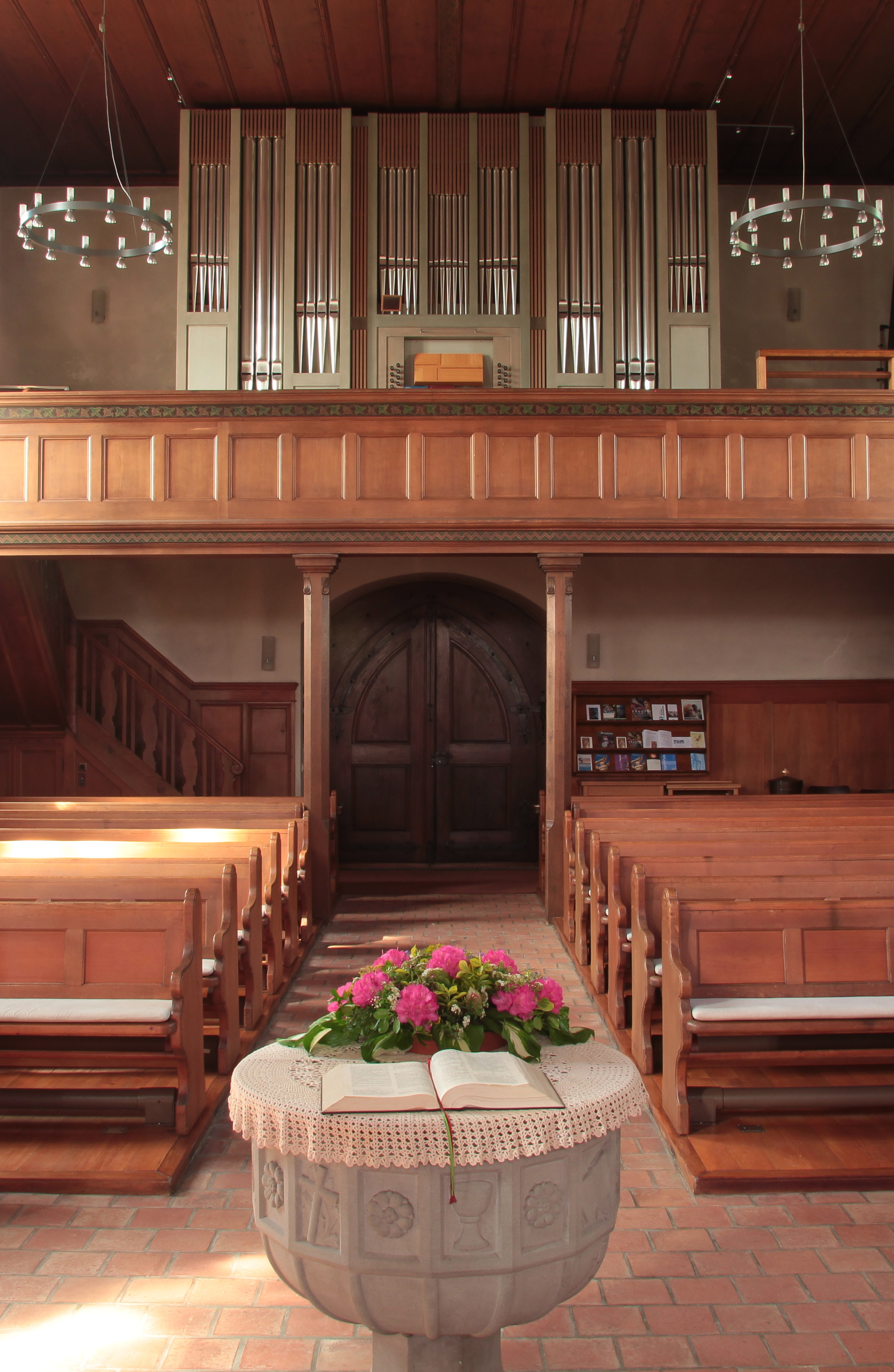 Bergkirche St. Nikolaus Rheinau ZH